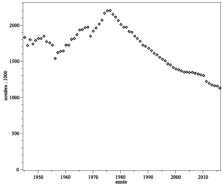 Evolution du nombre de permis de chasse en France